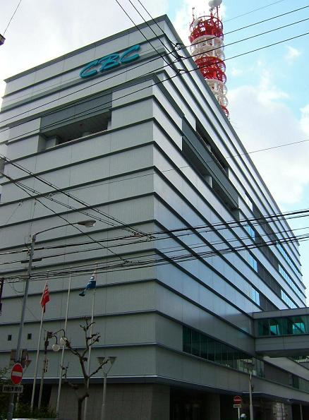 名古屋市中区新栄に所在するCBC放送センター。 投稿者:Gnsin 撮影日&場所:2005年1月31日、名古屋市中区のCBC放送センター前にて撮影。